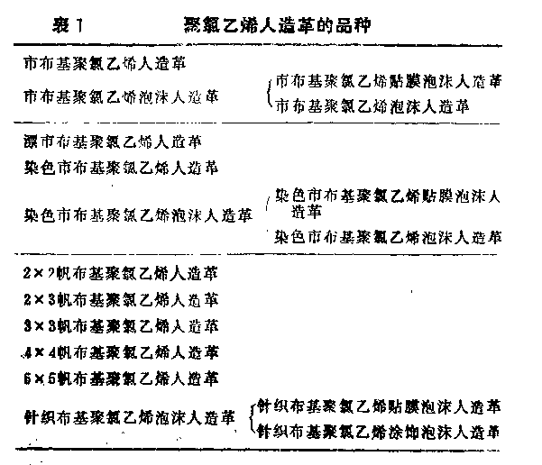 中文（中国大陆）: 聚氯乙烯人造革